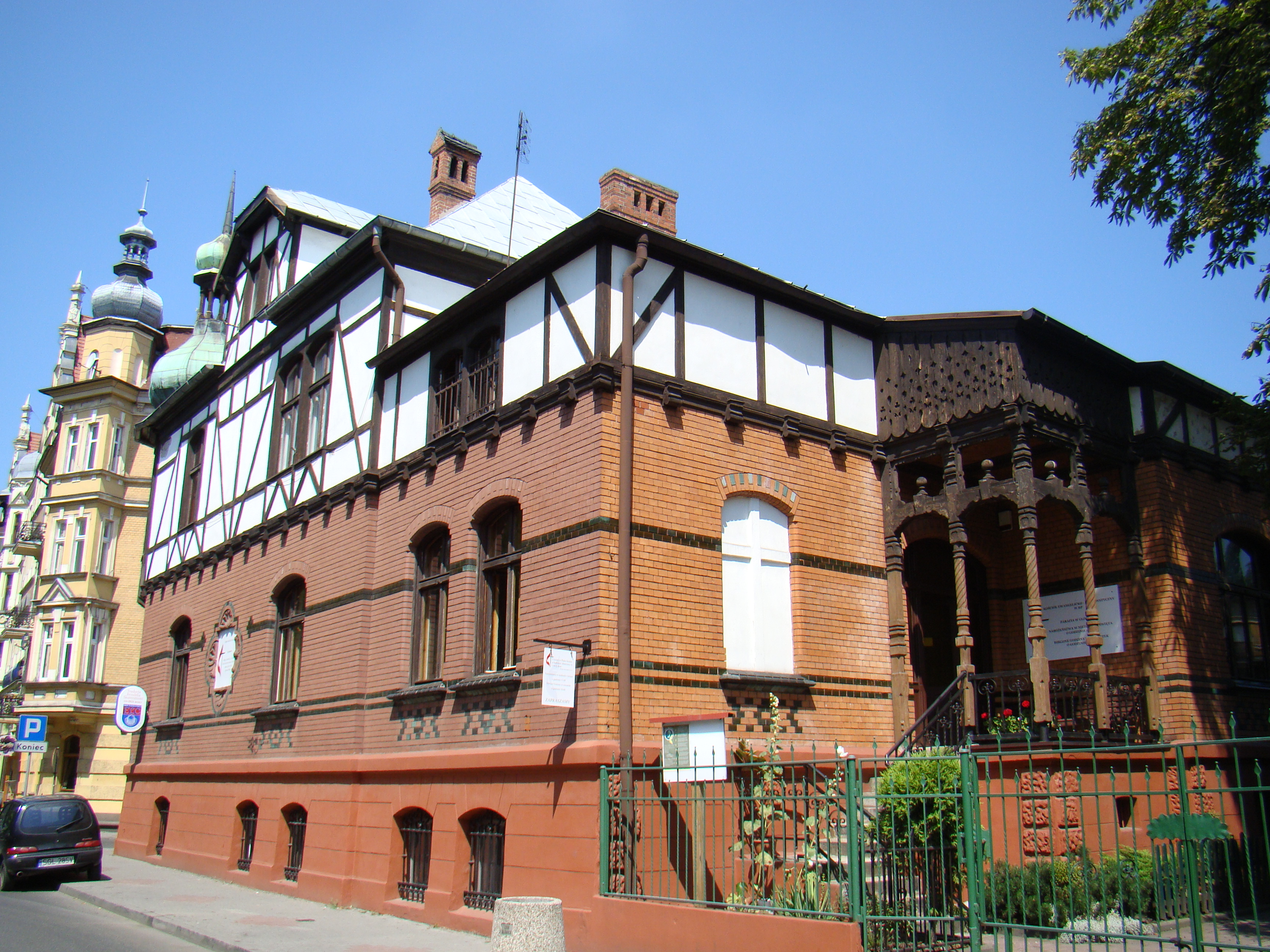 Gliwice, Budynek mieszkalny (obecnie kościół ewangelicko-metodystyczny), wzniesiony w 1899 roku w stylu historyzmu z wykorzystaniem elementów neobarokowych.